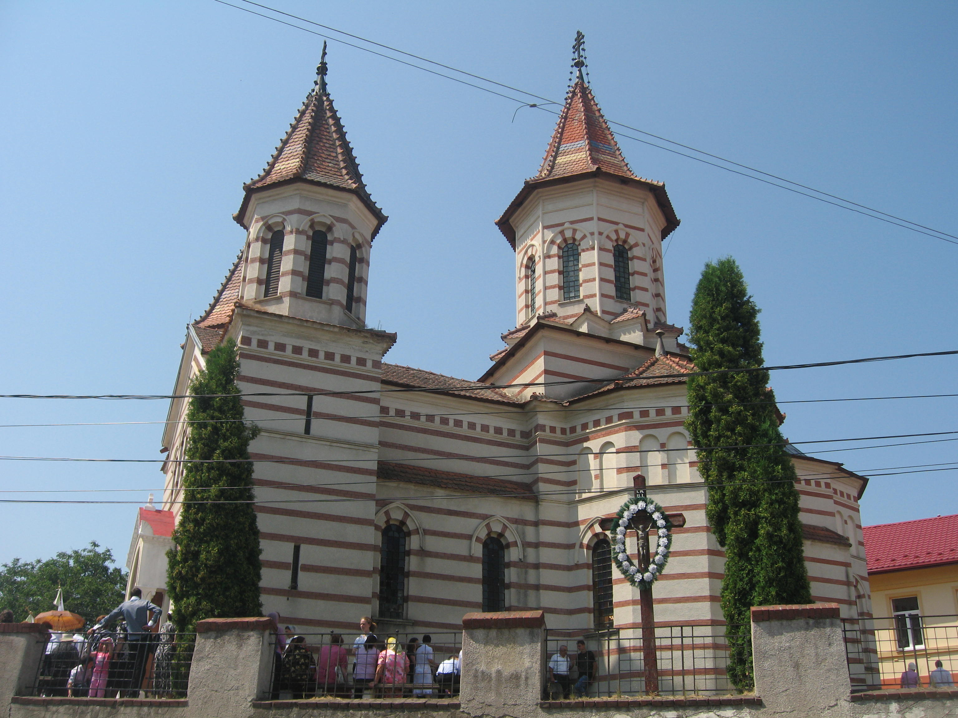 Biserica greco-catolica din Siret